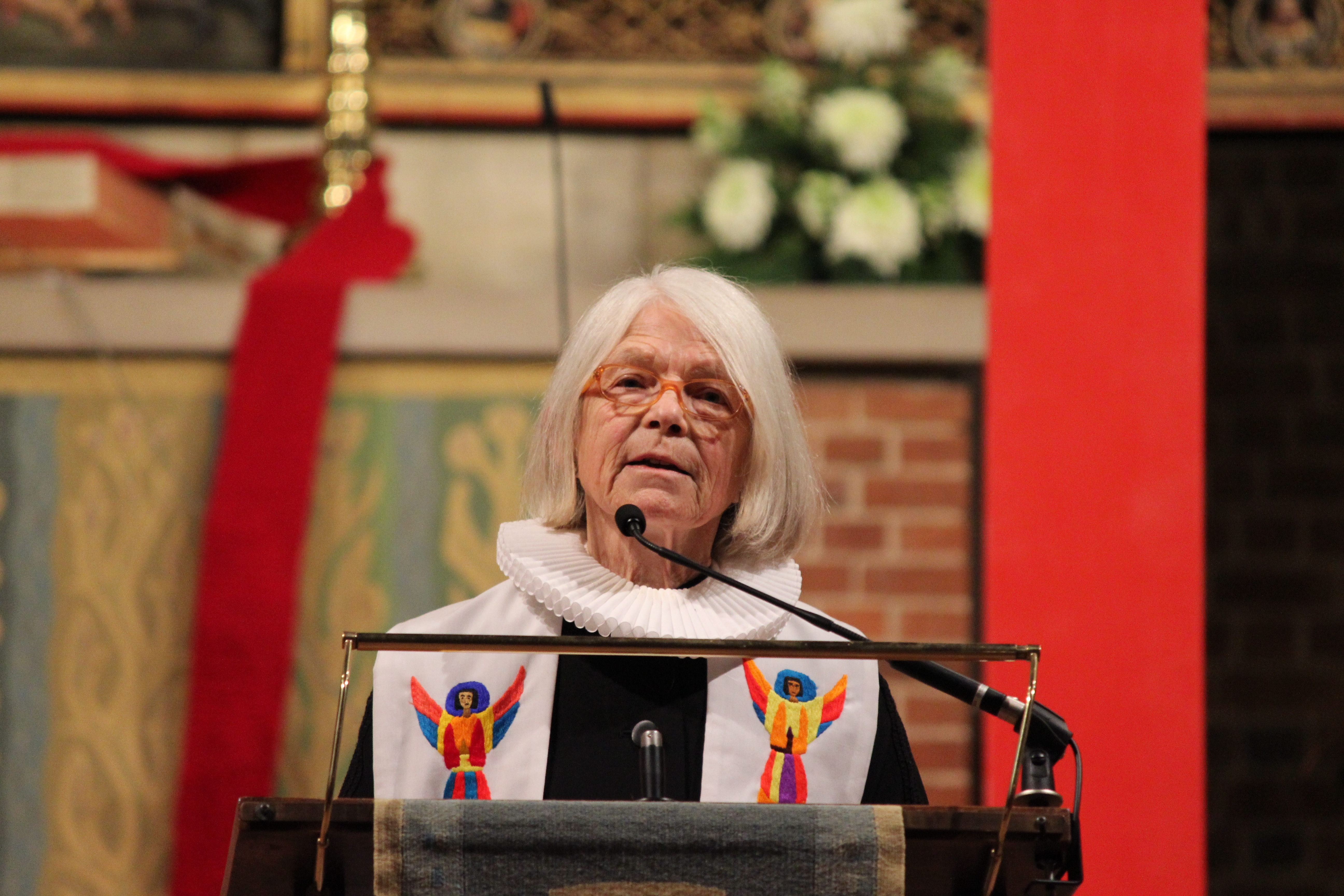 Bischöfin i.R. Maria Jepsen (Husum) hält die Predigt beim ökumenischen Gottesdienst zum Weltaidstag in der Marktkirche Hannover zum Weltaidstag 2015.